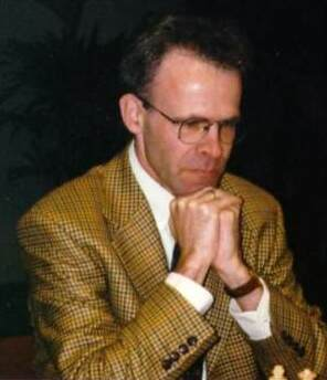 Paul van der Sterren